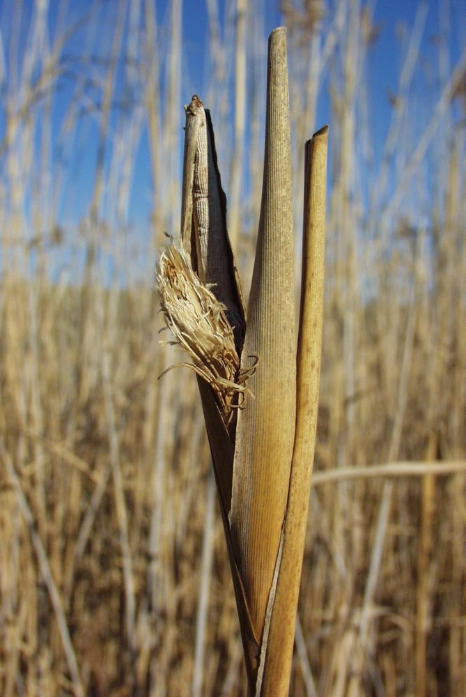 Lipara lucens (nádgubacslégy) gubacsa nádon, Mekszikópuszta